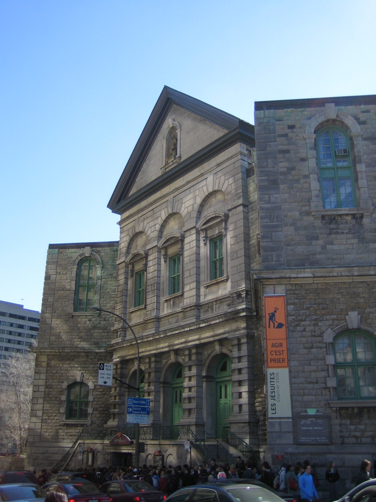 Théâtre Le Gesù, Montréal.